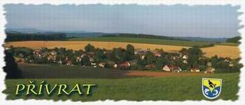 Česky: panorama obce Přívrat